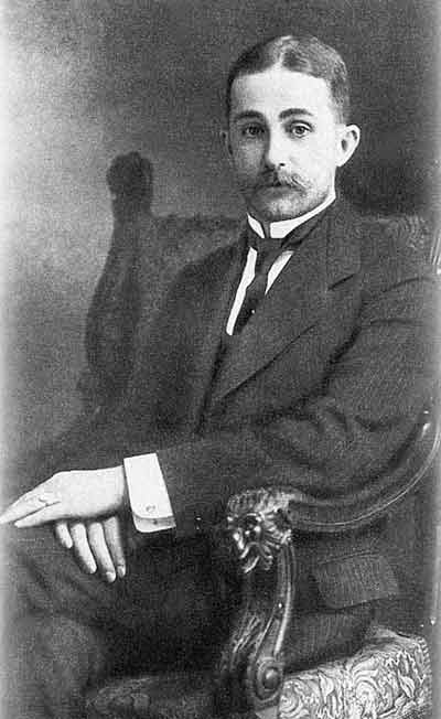 Агафон Карлович Фаберже (1876-1951), ювелир